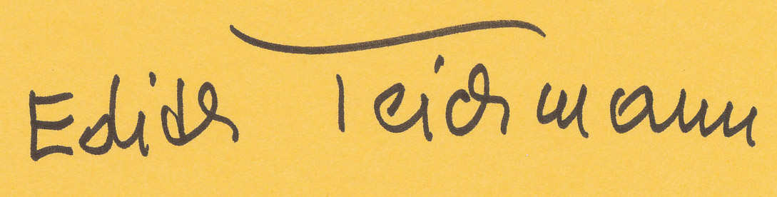 Signatur von Edith Teichmann